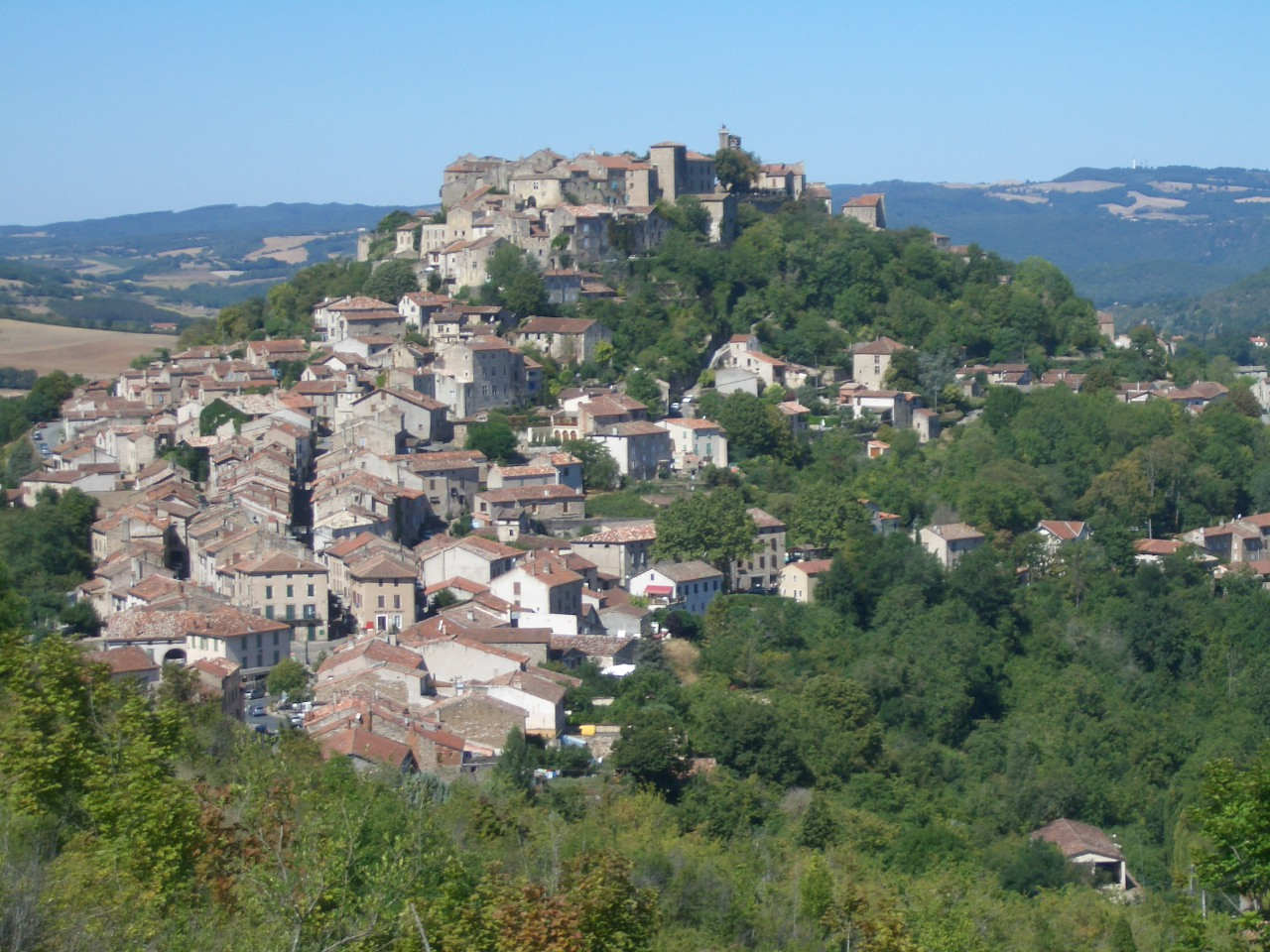 Vue de la grande rue de Cordes-sur-Ciel (Tarn, France)